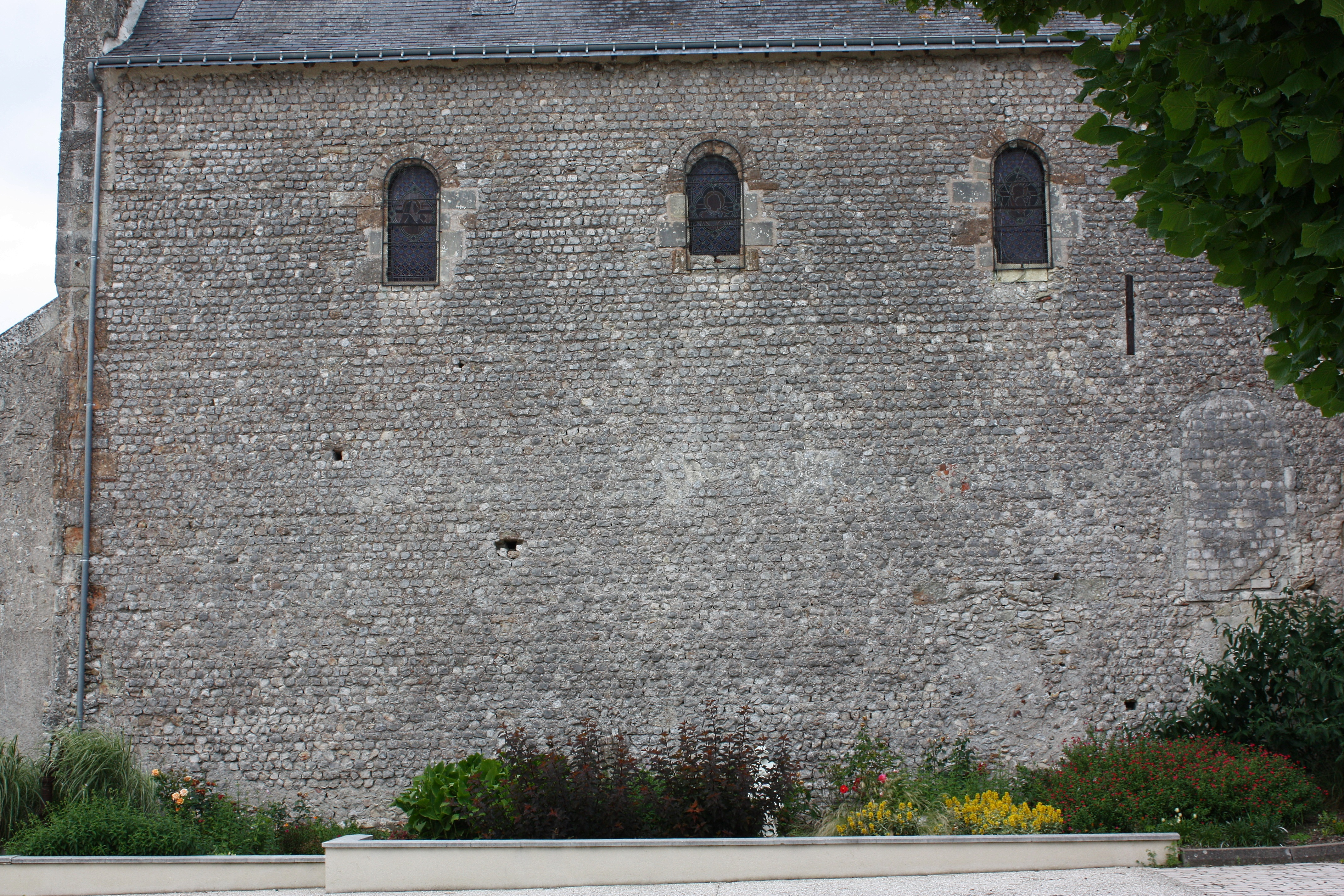 La nef vue du Sud.